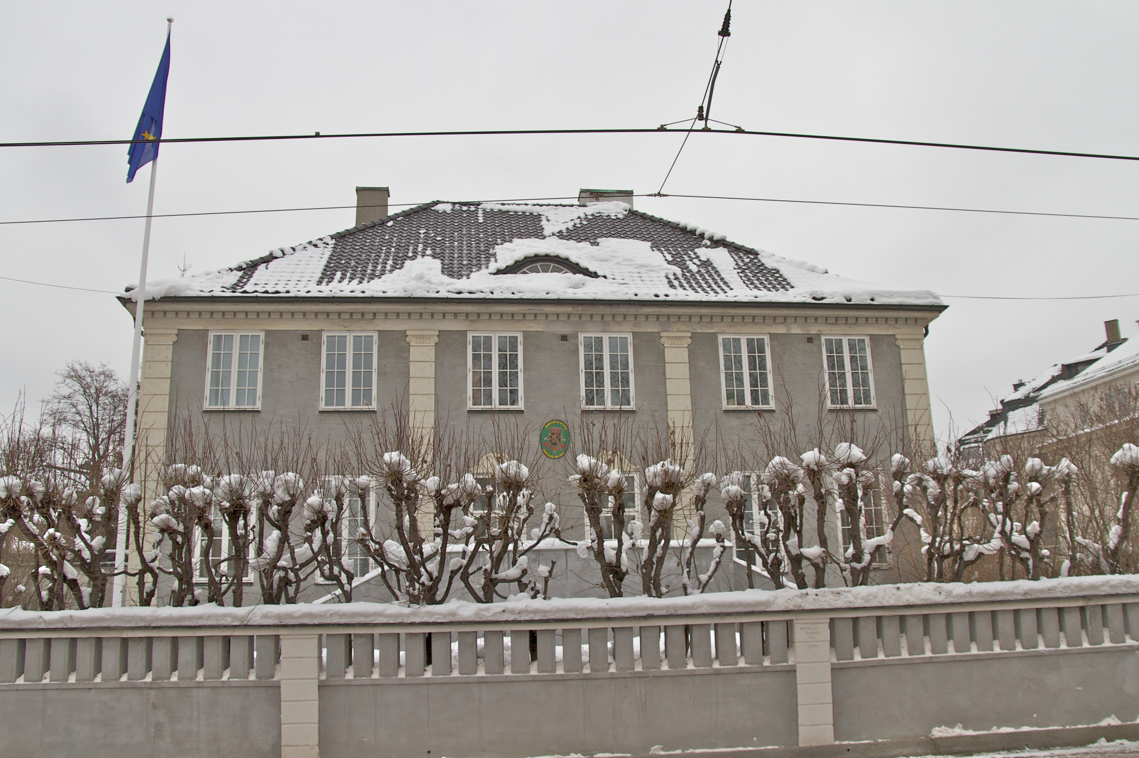 Drammensveien 103 D i Oslo.